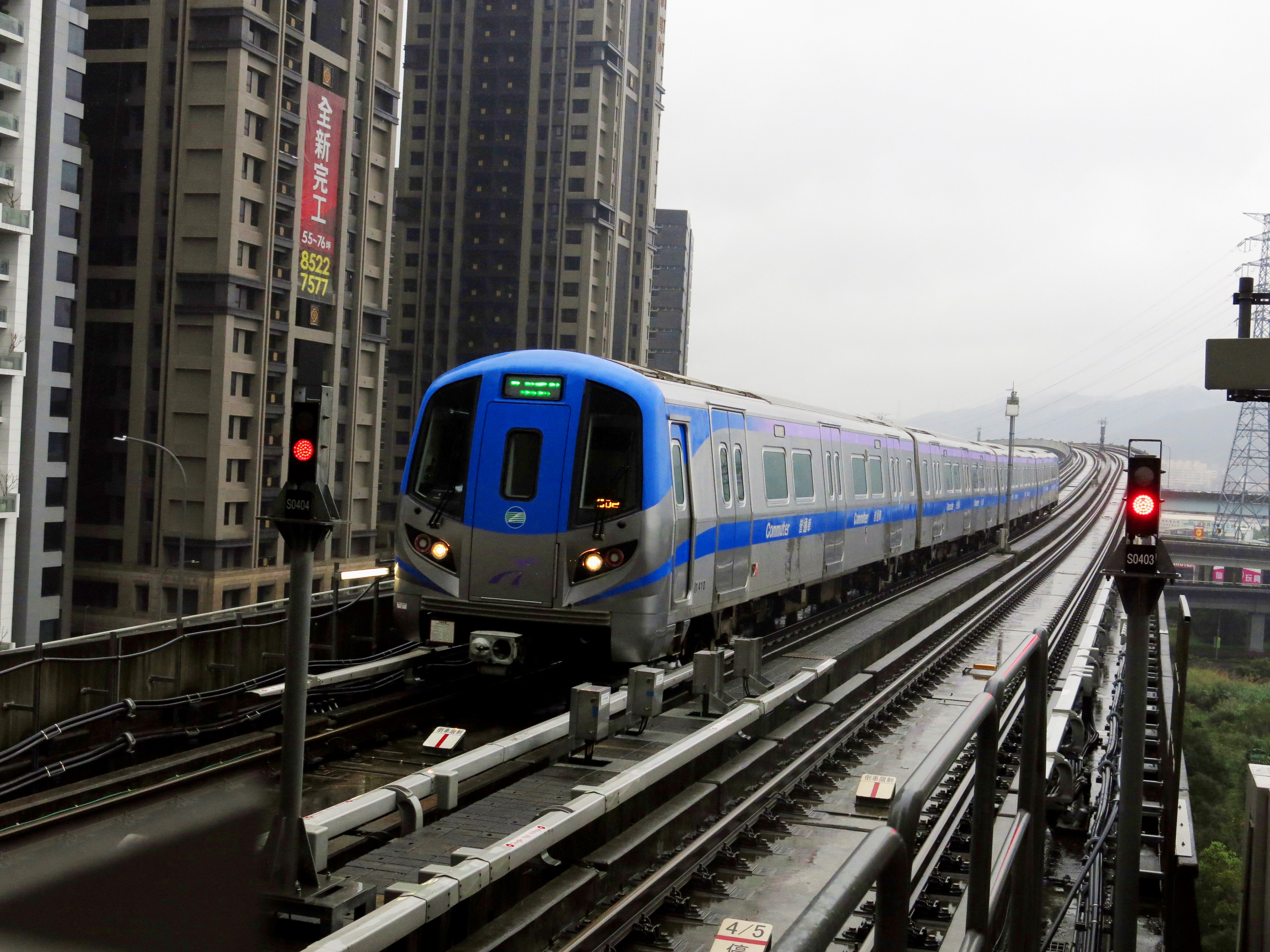 中文（台灣）: 桃園捷運普通車即將抵達新莊副都心站。